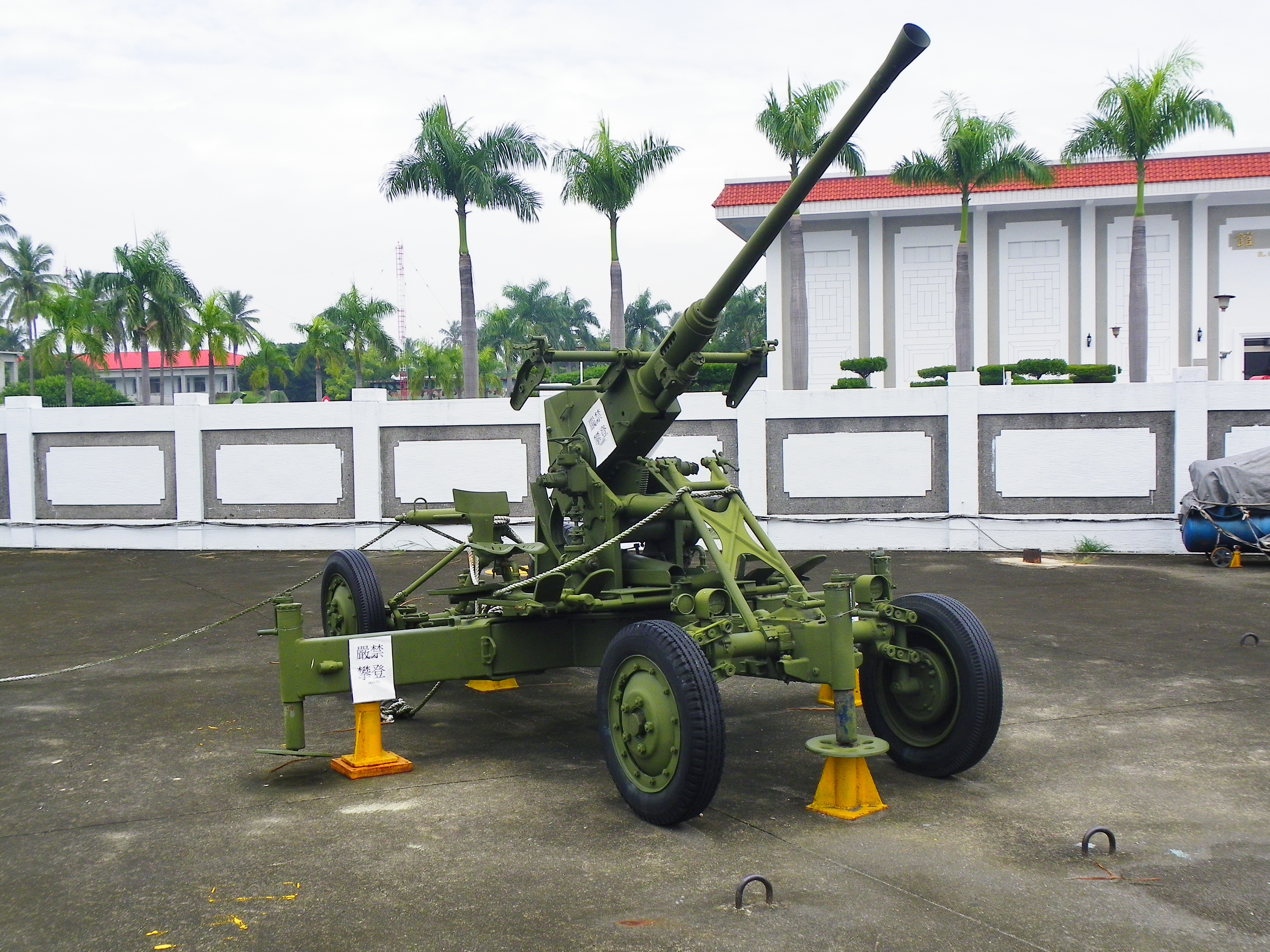 岡山空軍官校軍機展示場陳列之M1 40mm防空砲，波佛斯40快砲的美國版。